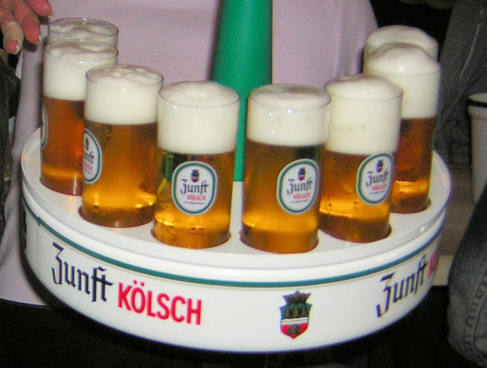 Kölsch (Bier) von der Erzquell Brauerei. Aufgenommen: 2006 mit Nikon Coolpix 2200